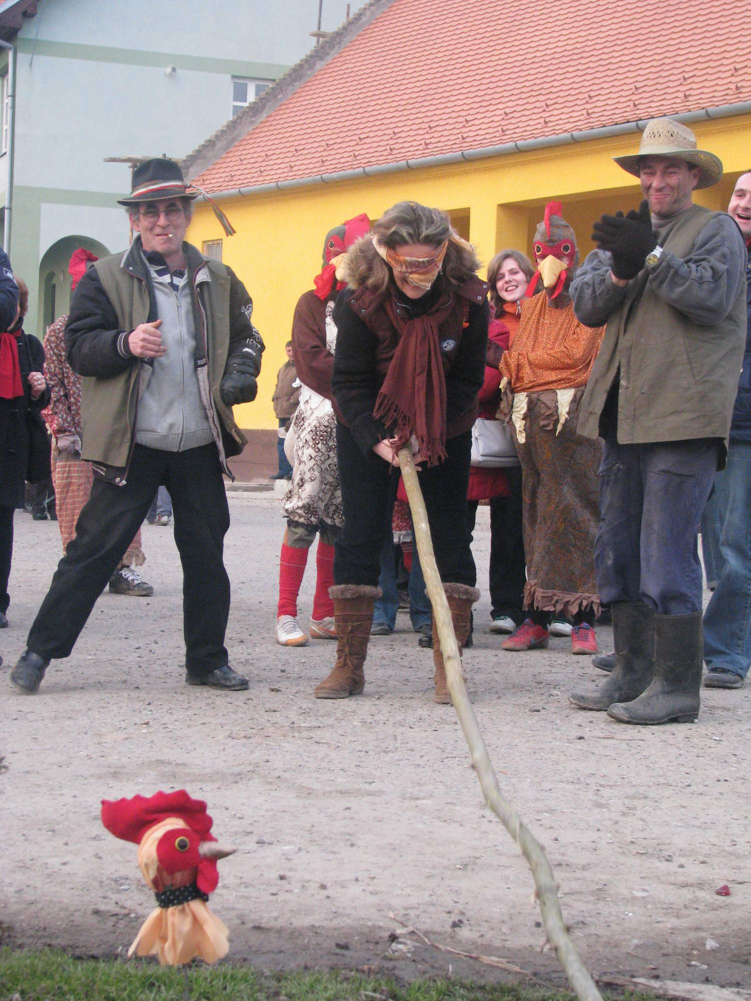 mađarski narodni običaj Kakasütés, Vardarac